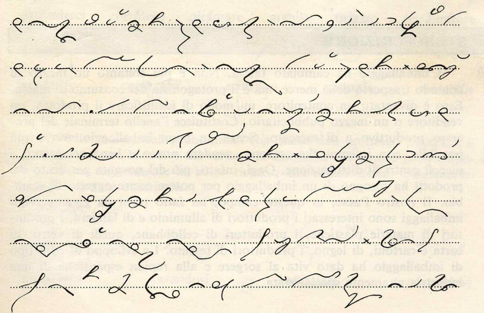 pagina in stenografia cimana